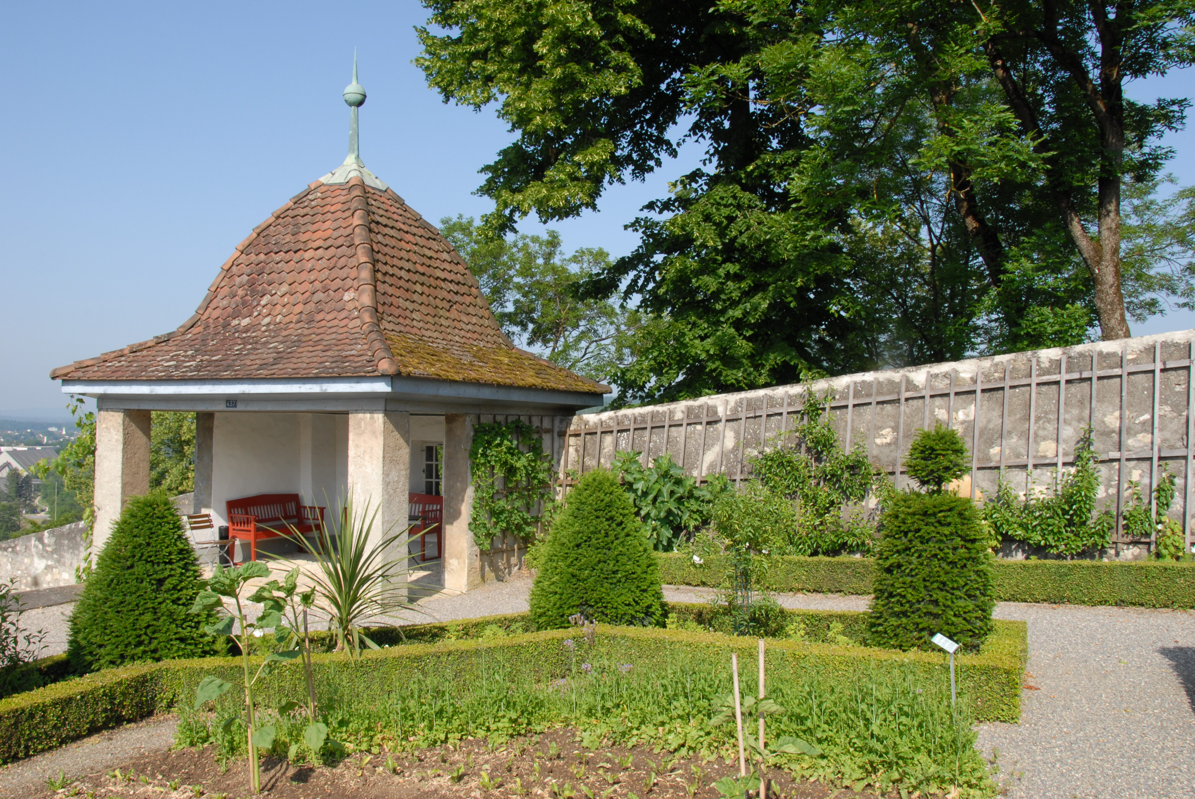 Lustgartenhäuschen im Barockgarten